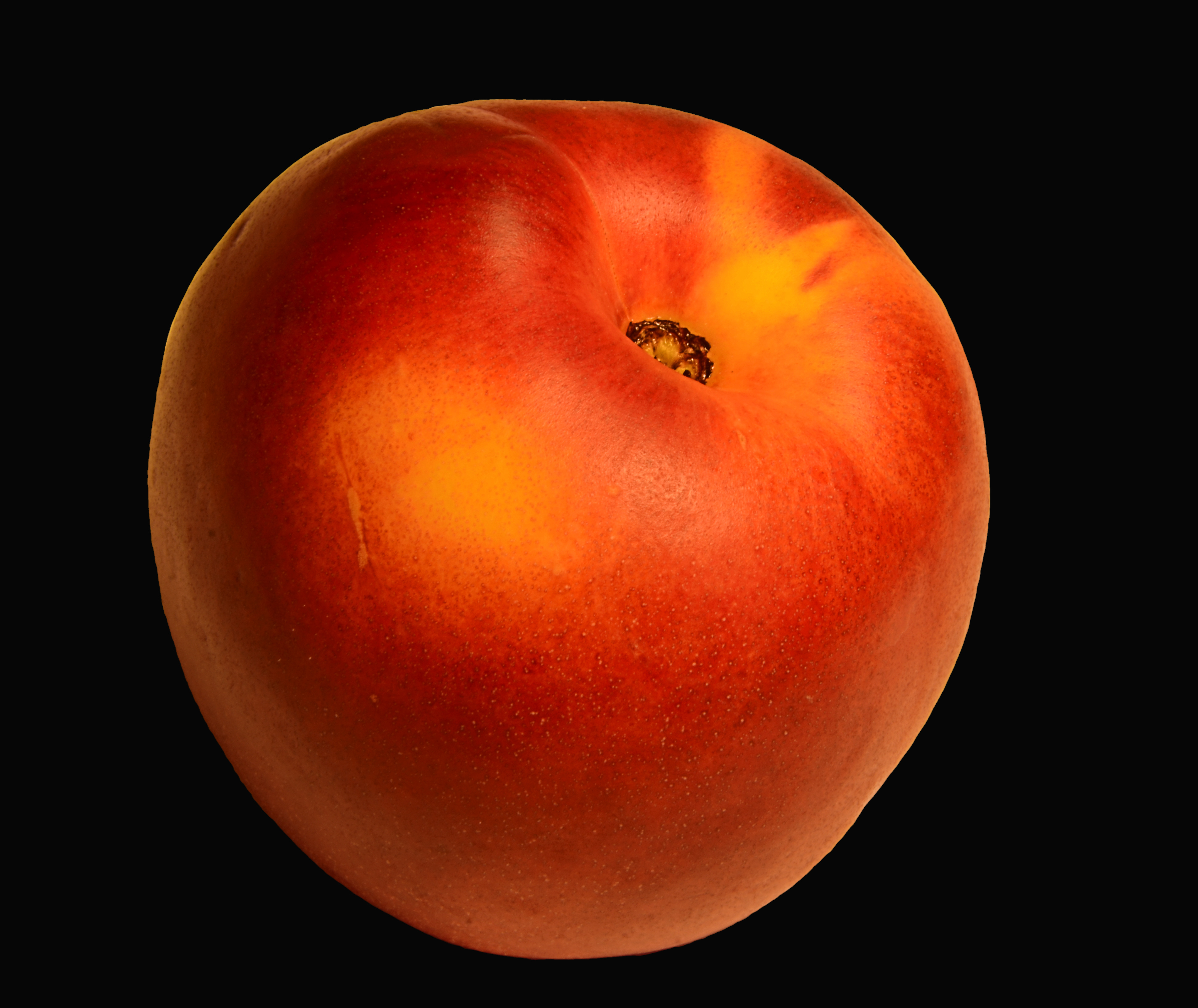 Nektarine